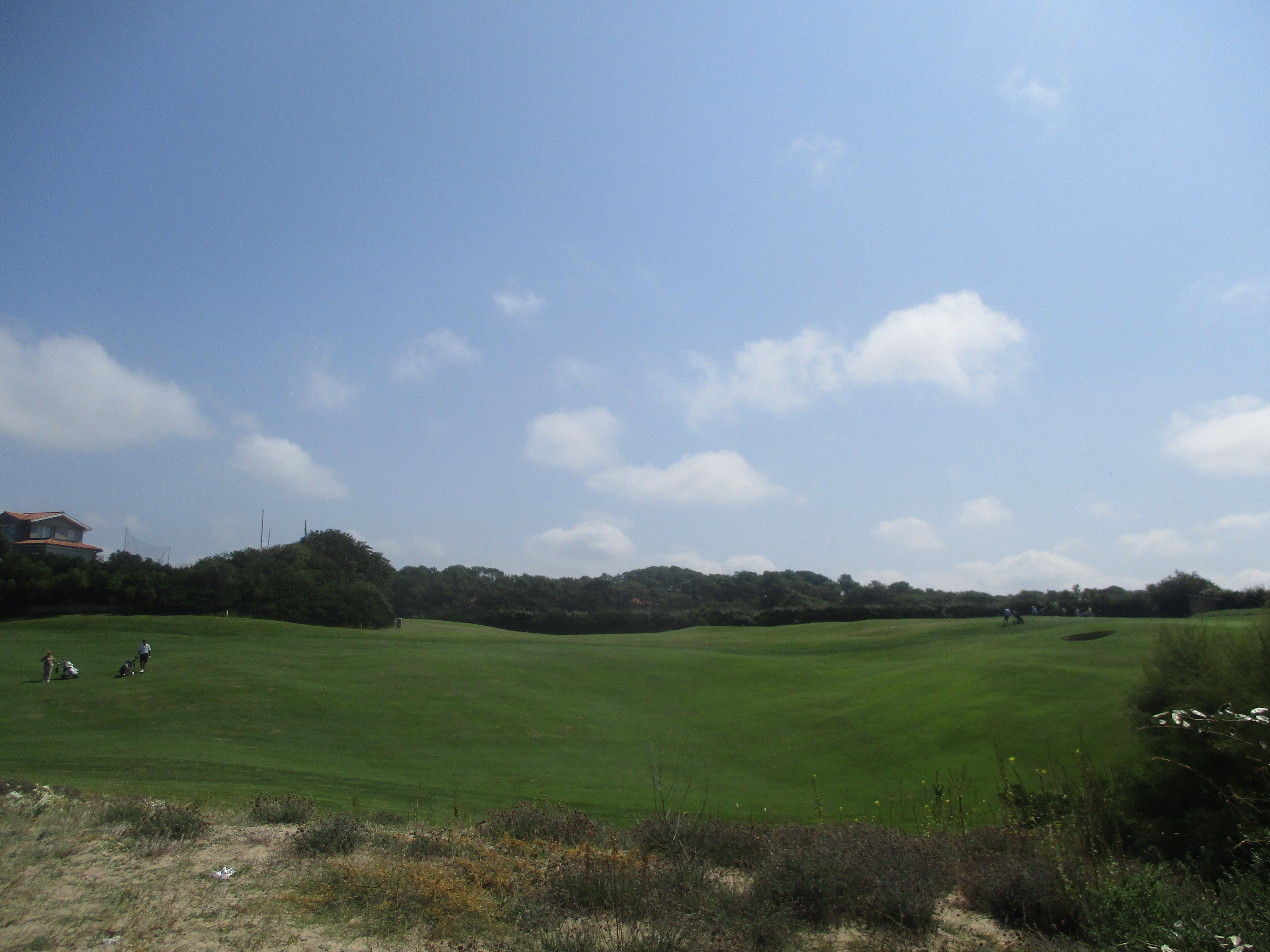 Golf de Chiberta à Anglet en front de mer.